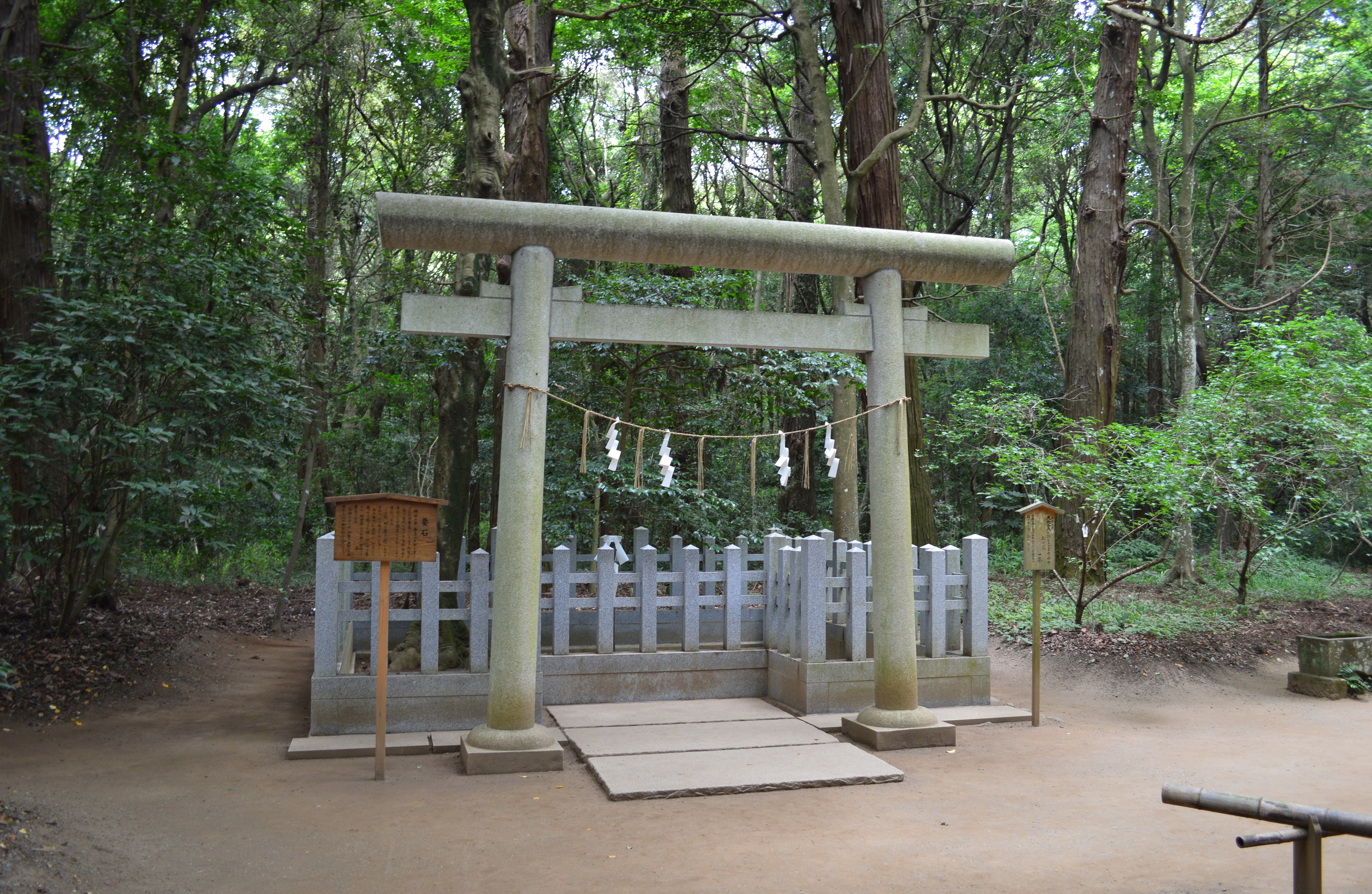 鹿島神宮 要石 遠景